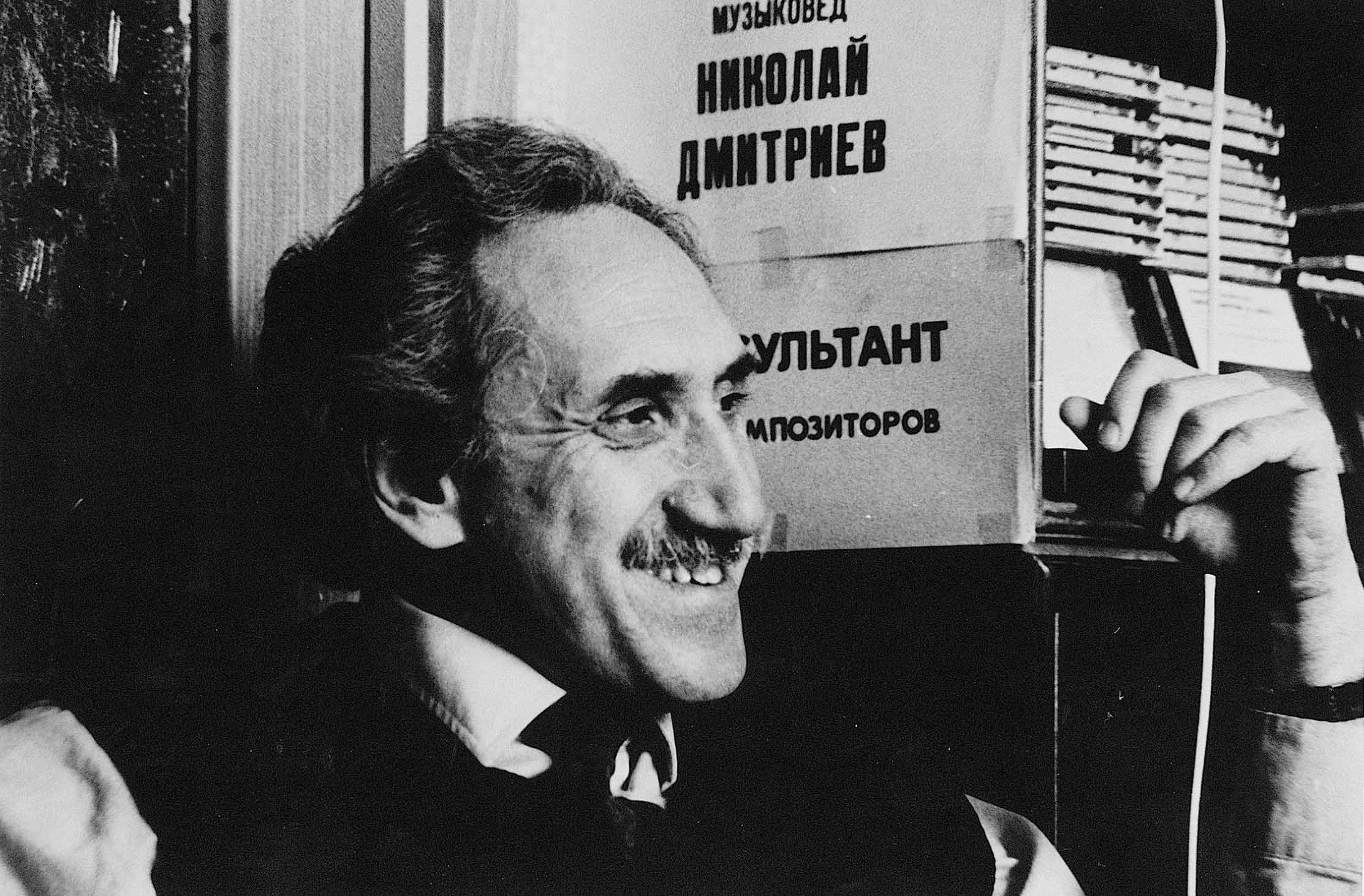 Д. Покровский в Союзе композиторов.